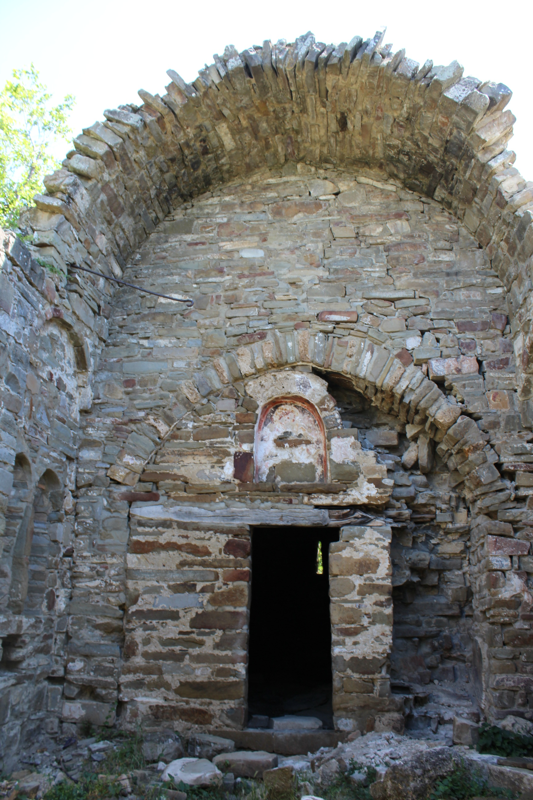 Gërmadhat e Manastirit Shën Pjetri dhe Pali, Ujëmirë.